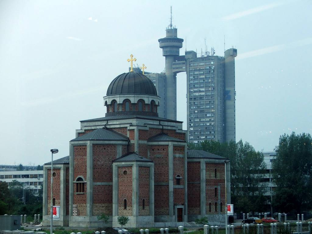 crkva Svetog Dimitrija, Novi Beograd fotografisala: Jelena Irić , Licensing